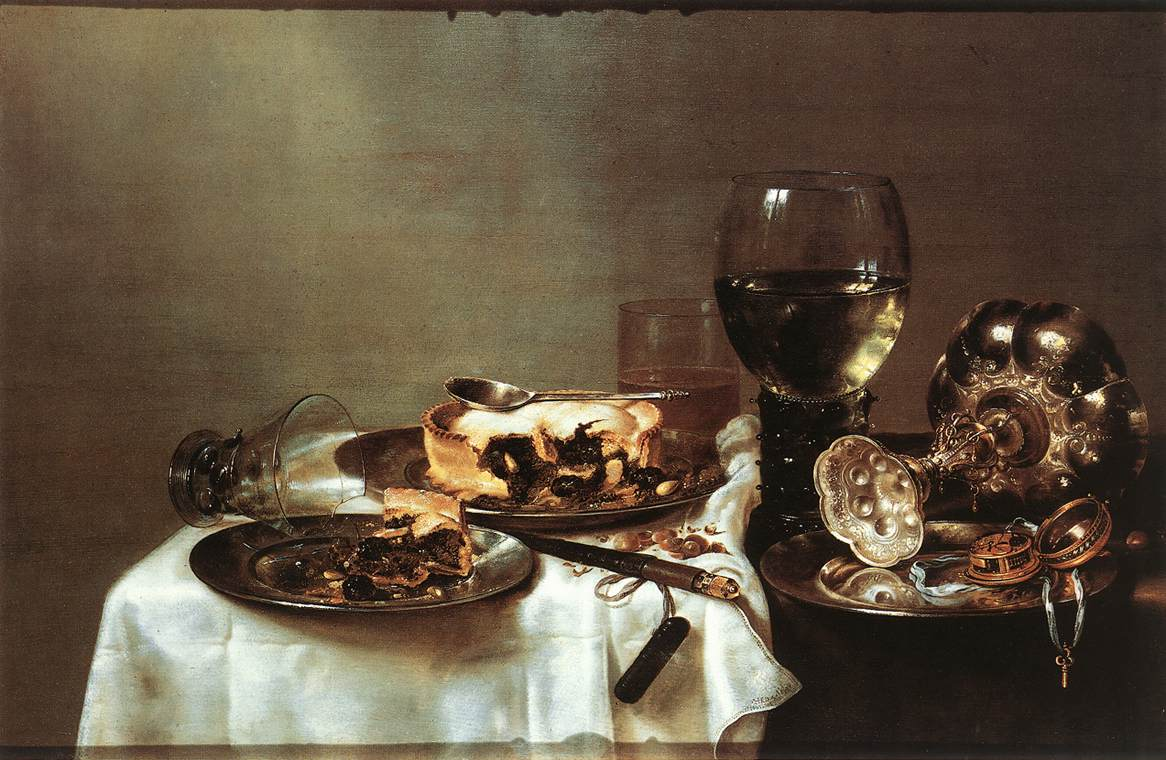 Still Life